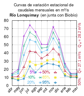 Curvas de variación estacional del río . # Dirección General de Aguas # Diagnóstico y clasificación de los cursos y cuerpos de agua según objetivos de calidad. Cuenca del río Biobío. # Santiago de Chile # Ministerio de Obras Públicas (Chile) # 2004 # url: # urlarchivo: # Tabla 4.1: Estación Lonquimay en junta con Bío Bío pág. 70 mes 5% 10% 20% 50% 85% 95% abr 15.077 13.766 12.464 10.641 9.225 8.675 may 19.931 17.583 15.136 11.44 8.156 6.666 jun 61.013 49.081 37.709 22.786 12.252 8.51 jul 74.289 65.597 56.419 42.299 29.665 24.084 ago 66.12 60.607 53.93 41.168 25.45 16.217 sep 50.75 45.986 41.02 33.518 26.855 23.831 oct 50.476 47.358 43.845 37.689 30.962 27.42 nov 72.09 65.619 58.159 45.383 32.405 26.117 dic 56.657 52.261 47.147 38.269 28.976 24.313 ene 27.265 24.932 22.372 18.187 14.092 12.132 feb 15.292 14.398 13.467 12.061 10.812 10.245 mar 15.459 14.496 13.492 11.976 10.629 10.018 This plot was created with Gnuplot.